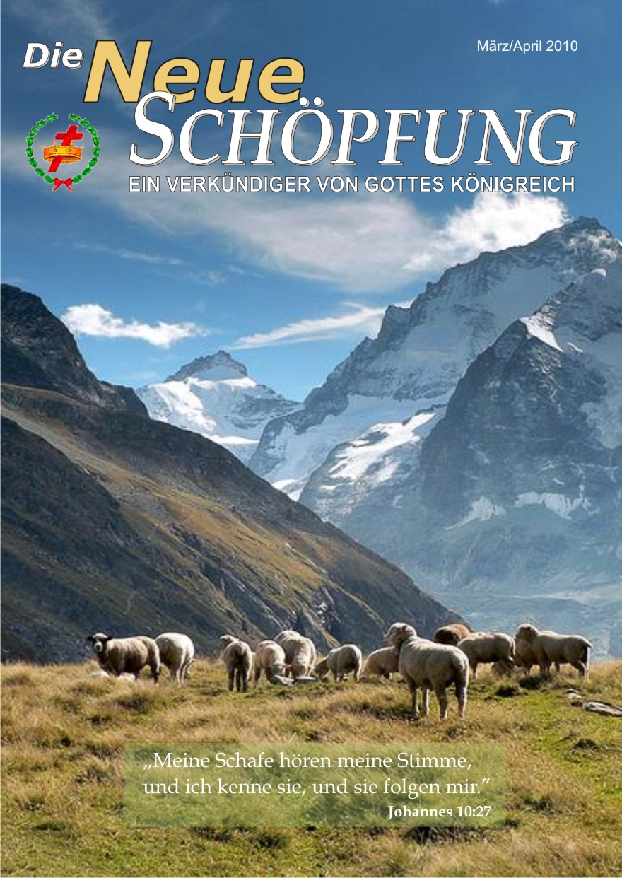 Die Titelseite der Zeitschrift von der Gemeinschaft der Freien Bibelforscher. Erscheint seit 1940 und hat kein Copyrigth.